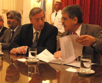 Casa Rosada, Salón Sur - El presidente Néstor Kirchner (junto con De Vido y Acevedo) durante la firma de ampliación del puerto de Caleta Paula.